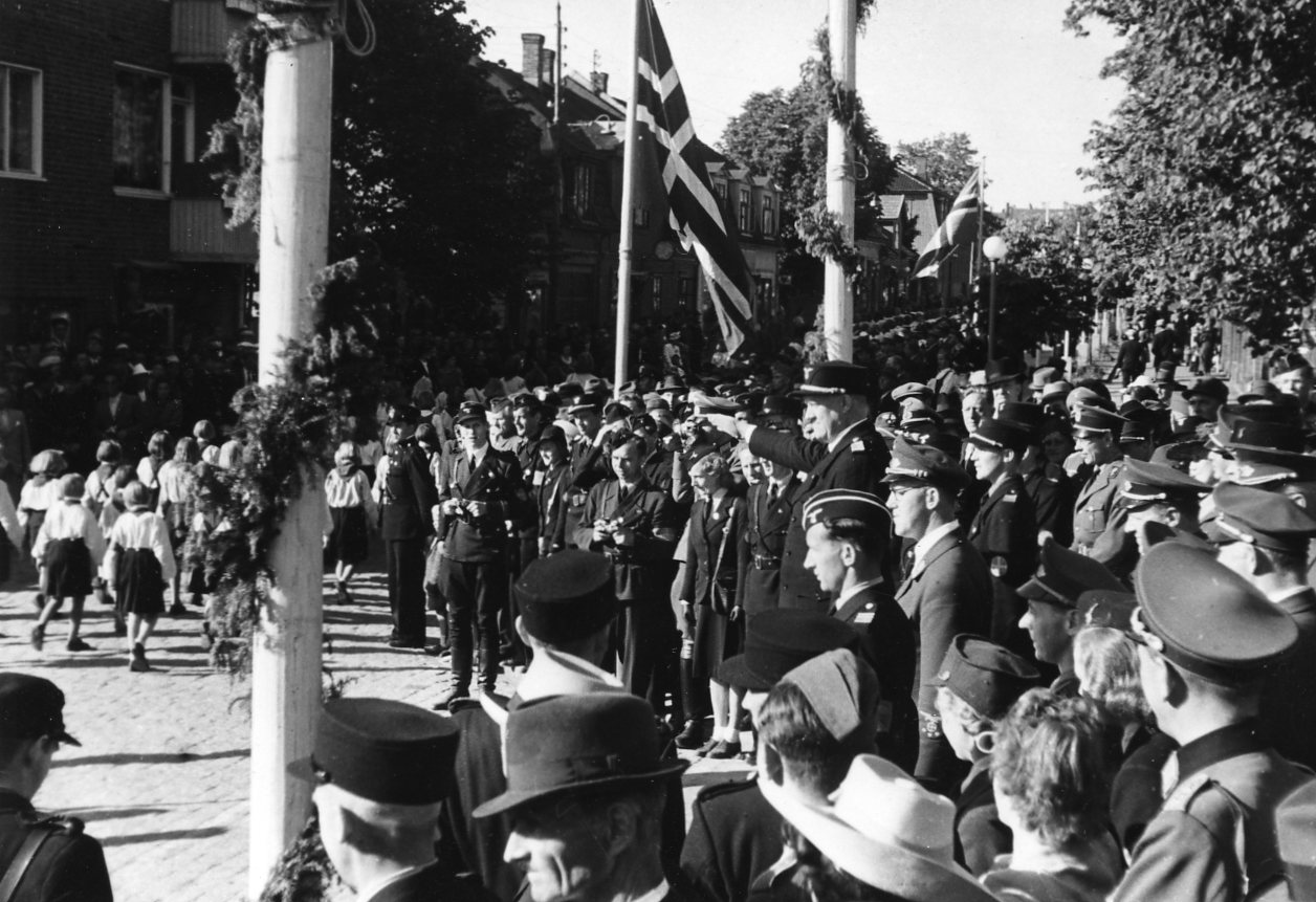 Datering: 1942/07. RA/RAFA-3309/U 41A/3 /41-3-23 img298 Nasjonal Samling, forkortet NS, var et norsk politisk parti som ble grunnlagt av Vidkun Quisling i 1933 og ble oppløst ved frigjøringa i 1945. Partiet la seg etterhvert nært opp mot nasjonalsosialismens ideologi og ble støtteorganisasjon for den tyske okkupasjonsmakta i Norge under andre verdenskrig.